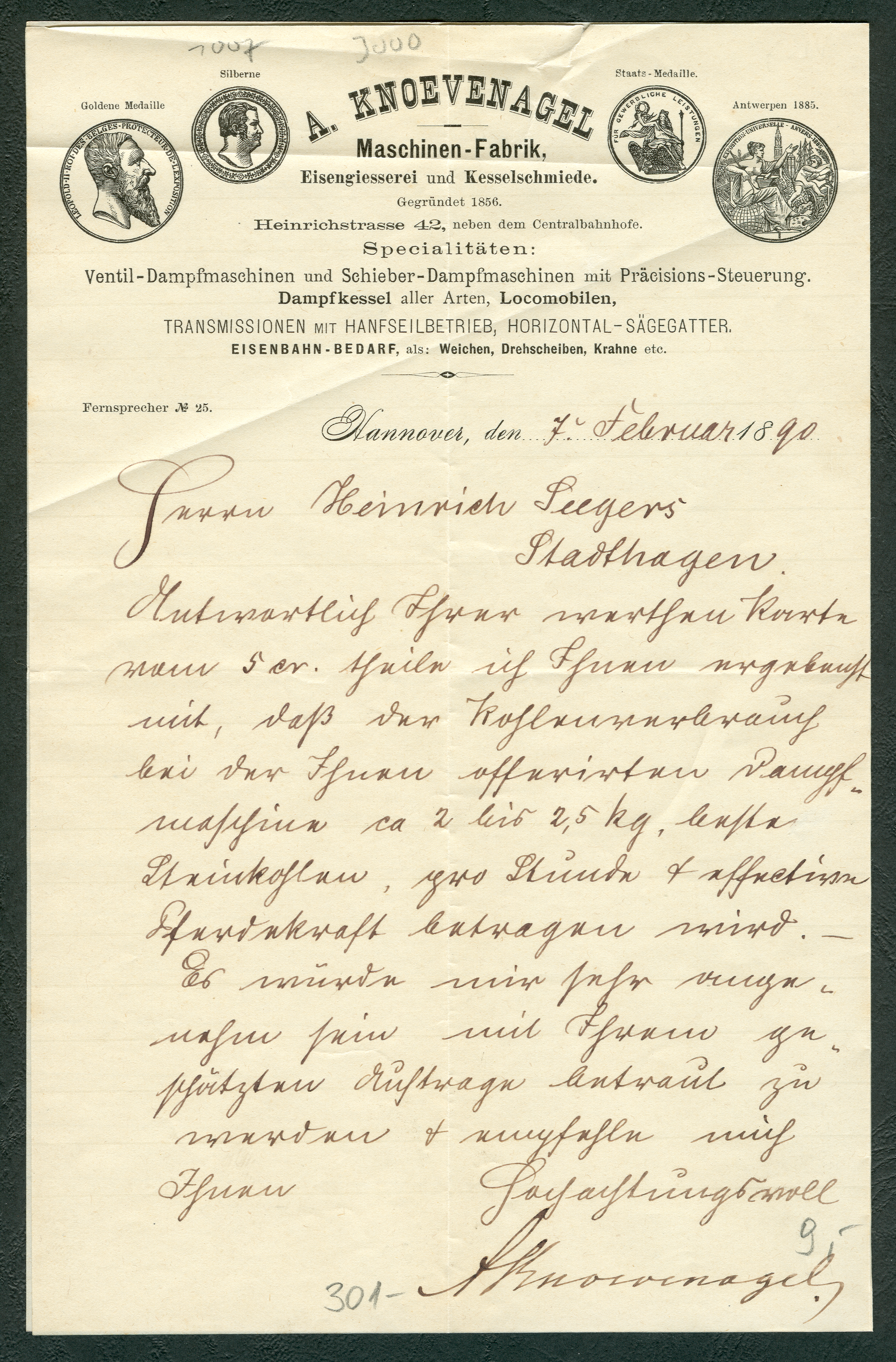 Briefbogen vom Beginn des Jahres 1890 der (Abschrift:) "A. Knoevenagel / Maschinen-Fabrik, Eisengiesserei und Kesselschmiede. / Gegründet 1856. / Heinrichstraße 42, neben dem Centralbahnhofe. / Specialitäten: / Ventil-Dampfmaschinen und Schieber-Dampfmaschinen mit Präcizsions-Steuerung. / Dampfkessel aller Art, Locomobilen, / Transmissionen mit Hanfseilbetrieb, Horizontal-Sägegatter. / Eisenbahn-Bedarf, als: Weichen, Drehscheiben, Krahne etc. / Fernsprecher No. 25 / Hannover, den...18..." Handschriftlich (Abschrift): "7. Februar 90 / Herrn Heinrich Seegers, Stadthagen. / Antwortlich Ihrer werthen Karte vom 5en. theile ich Ihnen ergebenst mit, daß der Kohlenverbrauch bei der Ihnen offerierten Dampfmaschine ca 2 bis 2,5 kg, ... Steinkohlen, pro Stück und affectirn (?) Pferdekraft betragen wird. - Es würde mir sehr angenehm sein mit Ihrem geschätzten Auftrage betraut zu werden und empfehle mich Ihnen Hochachtungsvoll AKnoevenagel. Im Briefkopf sind die Abbildungen zweier Medaillen/Prämien/Auszeichnungen (mit Vor- und Rückseite) zu sehen, zum einen eine "Silberne Staats-Medaille (eines noch unidentifizierten Herrschers unbekannten Datums) Für gewerbliche Leistungen". Zum Anderen die "Goldene Medaille Antwerpen 1885" unter König Leopold II. von Belgien. Maße des gesammten Blattes ca. 28,5 cm x 22,05 cm. Es wurde zunächst nach links geknickt, so daß eigentlich vier Seiten entstanden (von denen hier eine zu sehen ist). Als Wasserzeichen trägt es von links nach rechts durchgehende parallele Linien (jedoch nicht im Briefkopf und Brieffuß), so daß von einer Hilfe zum Verfassen waagerecht ausgerichteter Handschrift auszugehen ist.